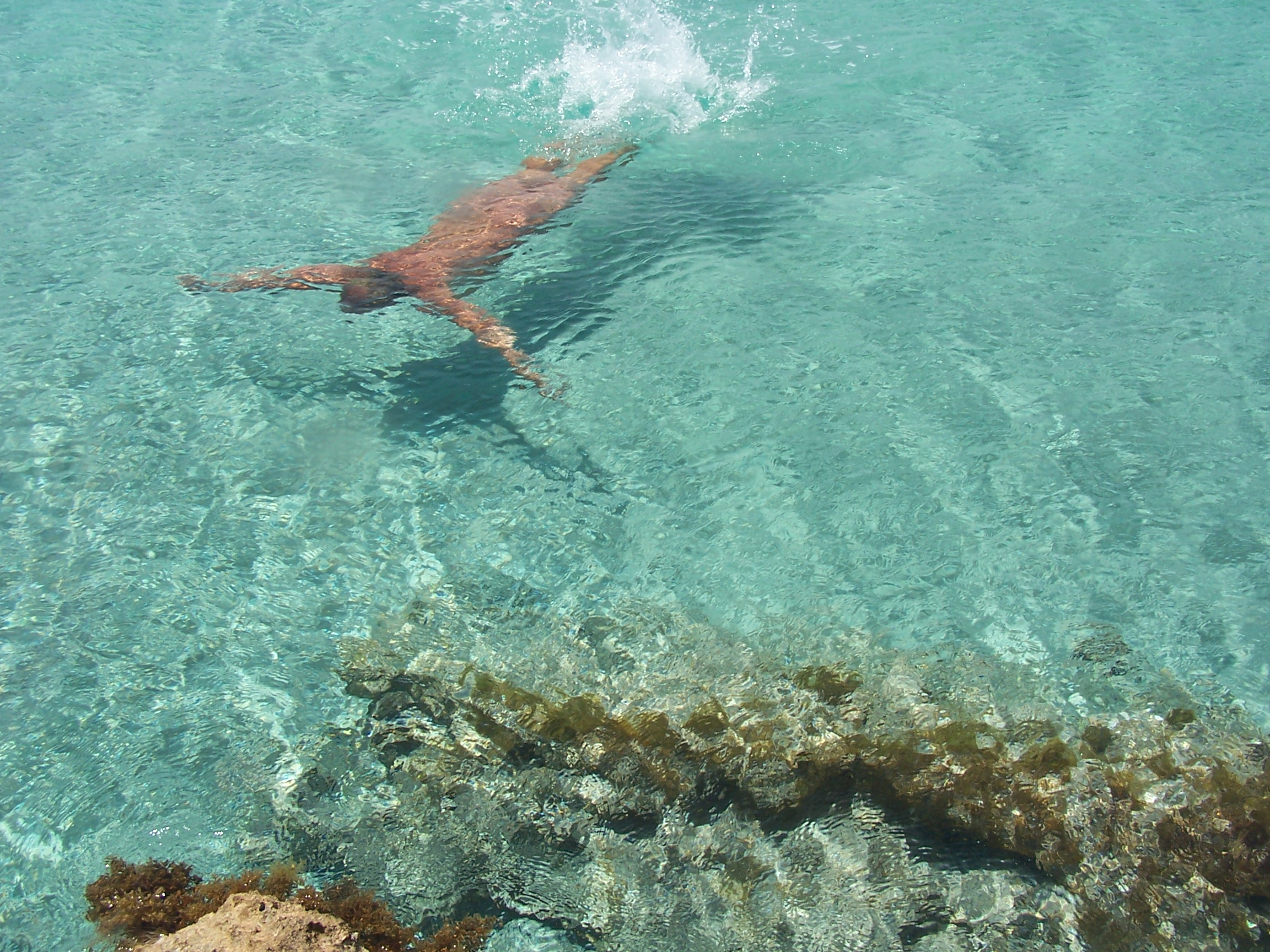 Un homme catalan nage nu dans la mer, sur la plage de Migjorn, Formentera, Baléares.